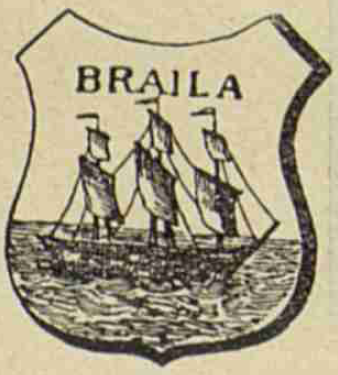 Autor - Macreanu Iulian Descriere - Stema judeţului Brăila din perioada 1864-1918 Sursă - imagine scanată din Manualul de geografie pentru gimanziu 1899 Restricţii - fără restricţii